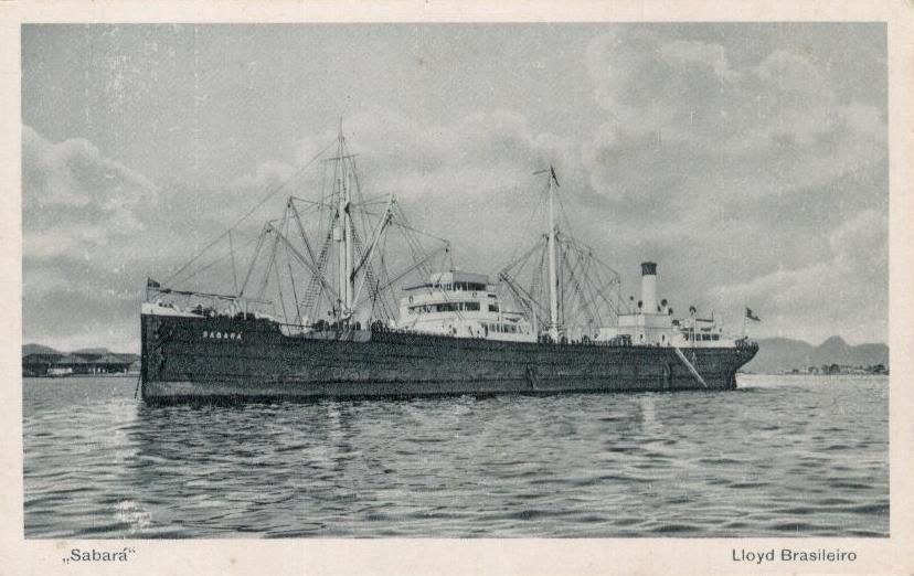 Die Sabada des Lloyd Brasileiro, bis 1917 das erste seegehende Motorschiff Deutschlands: die Monte Penedo der HSDG